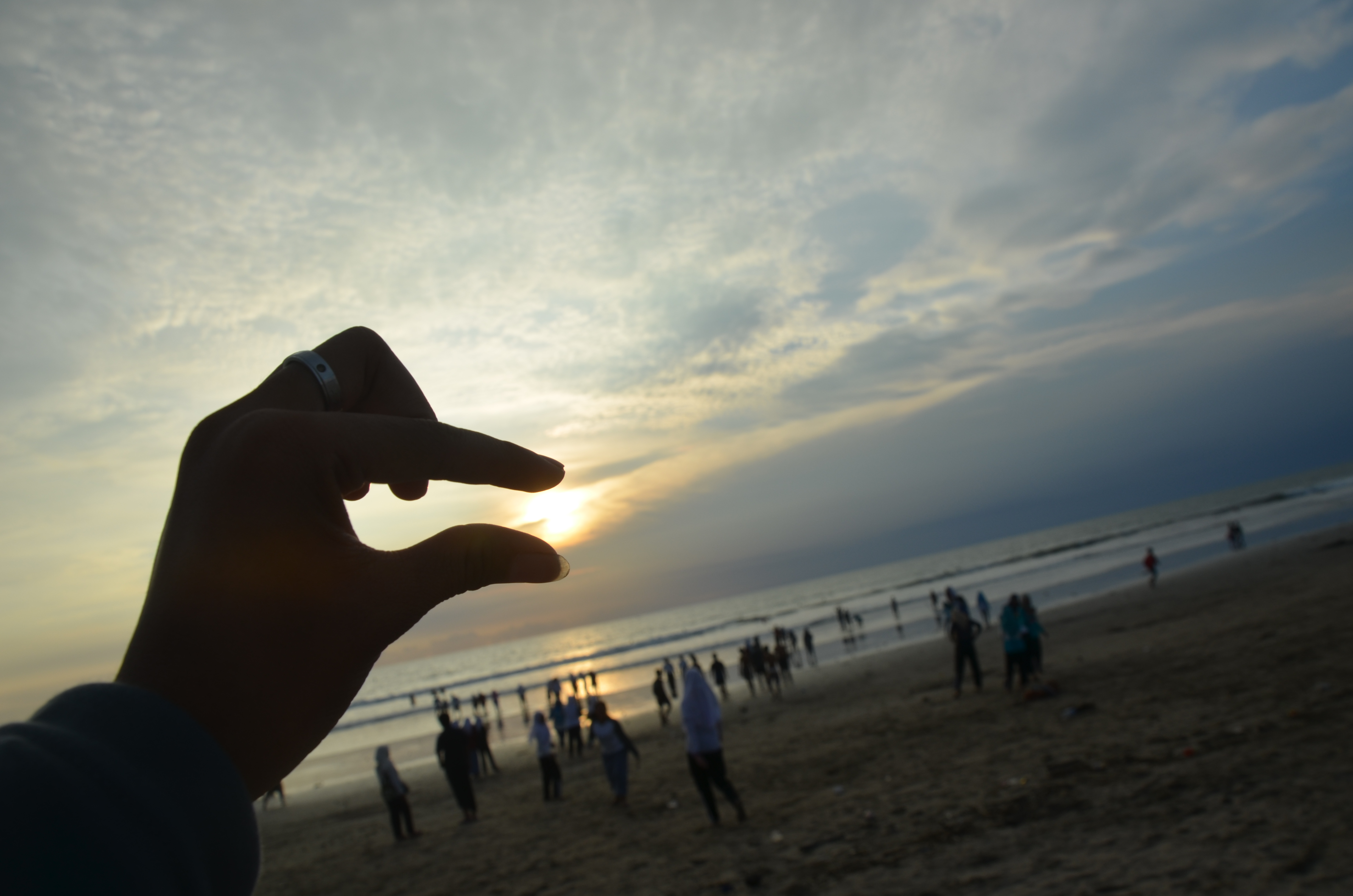 Basa Jawa: iki gambar srengéngé angslup kang kajipuk saka Pantai Pandawa ing Kuta kidul, Kabupaten Bandung, Bali. pantai iki uga kasebat pantai ndhelik.